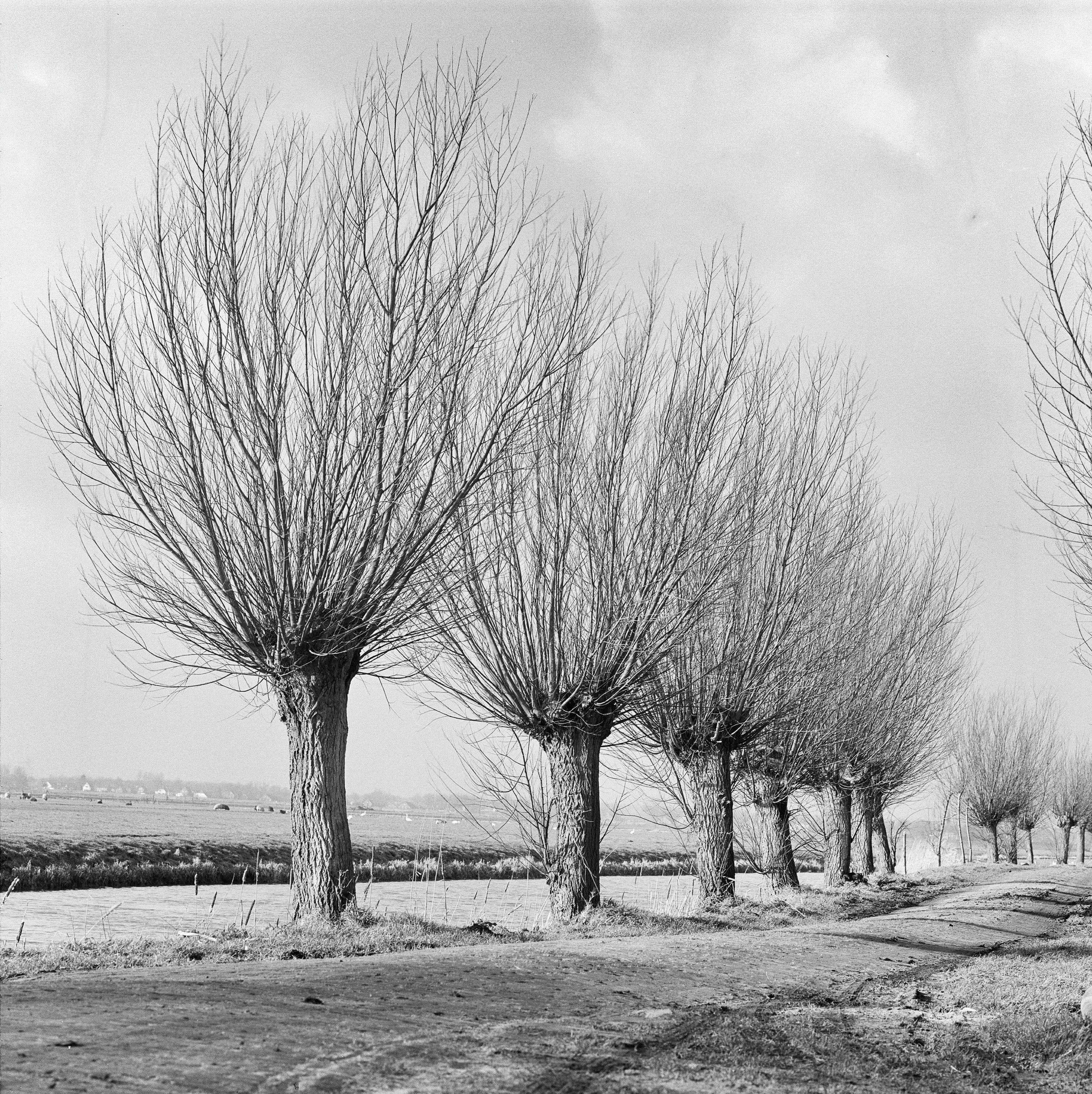 Riet/Boom: Overzicht, knotwilgen in de Eempolder (opmerking: Gefotografeerd voor Het Weke Dak, bladzijde 25)